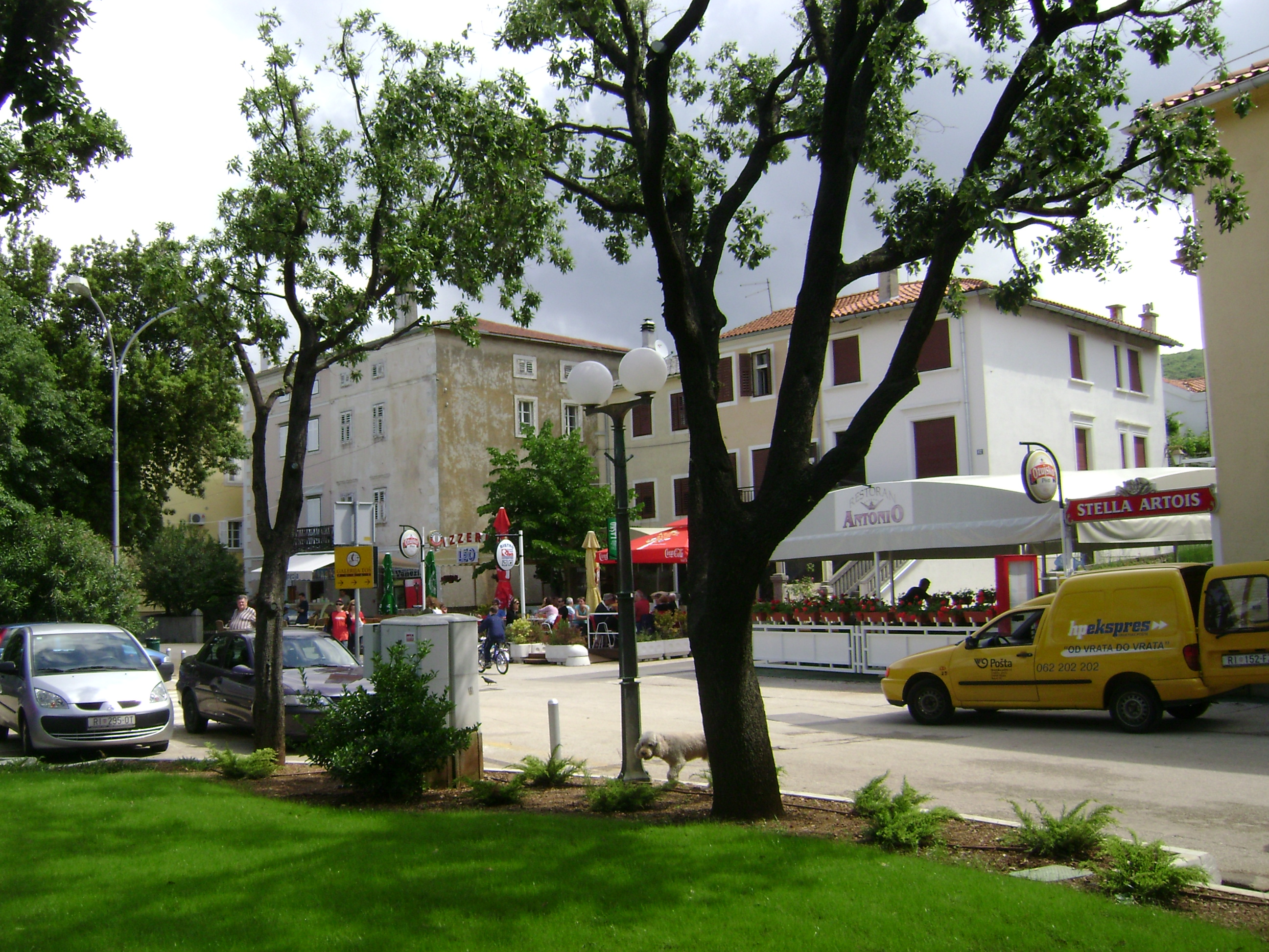 Panorama Punat